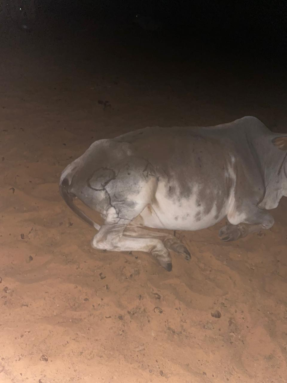 العمامة ) علامة تميز ماشية المنطقة )